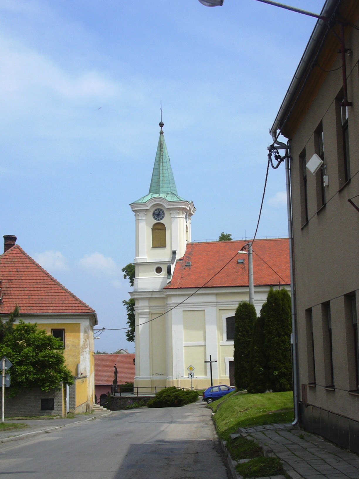 Kostel sv. Jiří, Moravské Prusy (Vyškov District - Czech Republic)